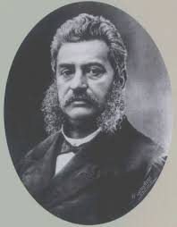 Accademico, politico, presidente della Camera e ministro del Regno d'Italia